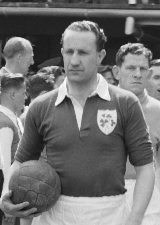 Con Martin in 1956.